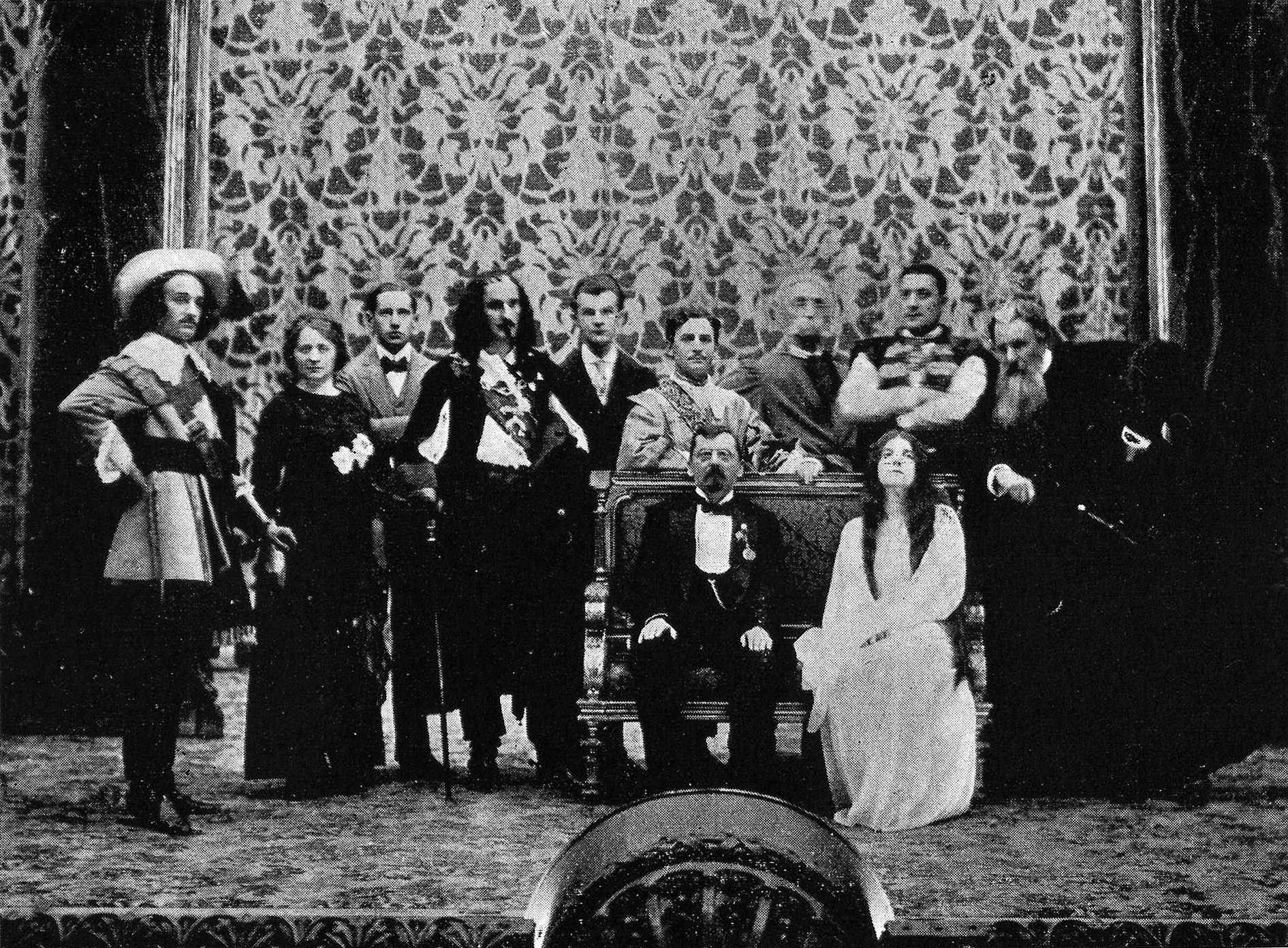 Antoni Grabowski (sidanta) en la Urba Teatro (hodiaŭ Teatro Juliusz Słowacki) kun aktoroj lundantaj en la spektaklo Mazepa de Juliusz Słowacki dum la Universala Kongreso de Esperanto de Krakovo en 1912.